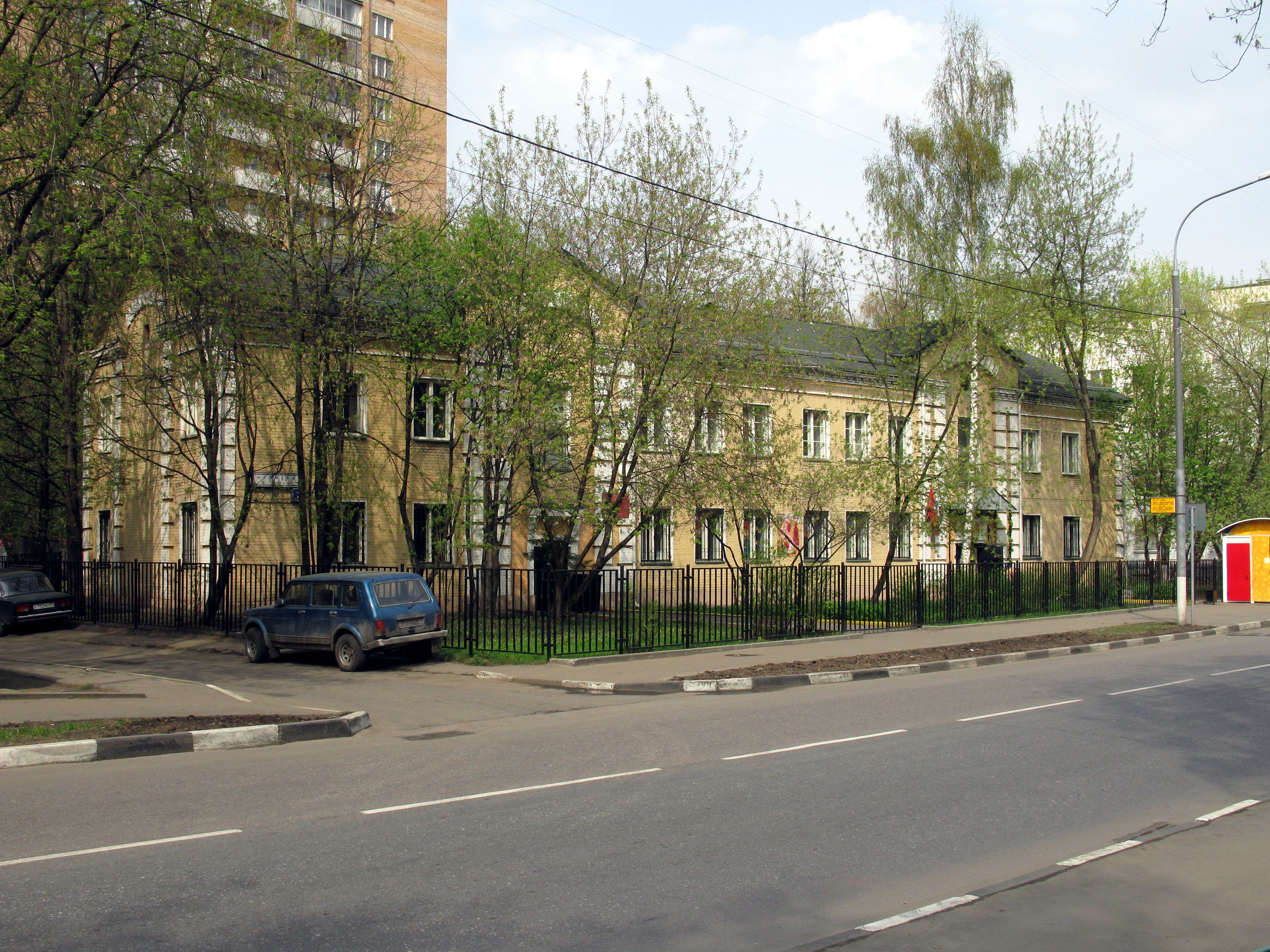 Чусовская улица, д.7к1 Музыкальная школа. Гольяново, Москва.